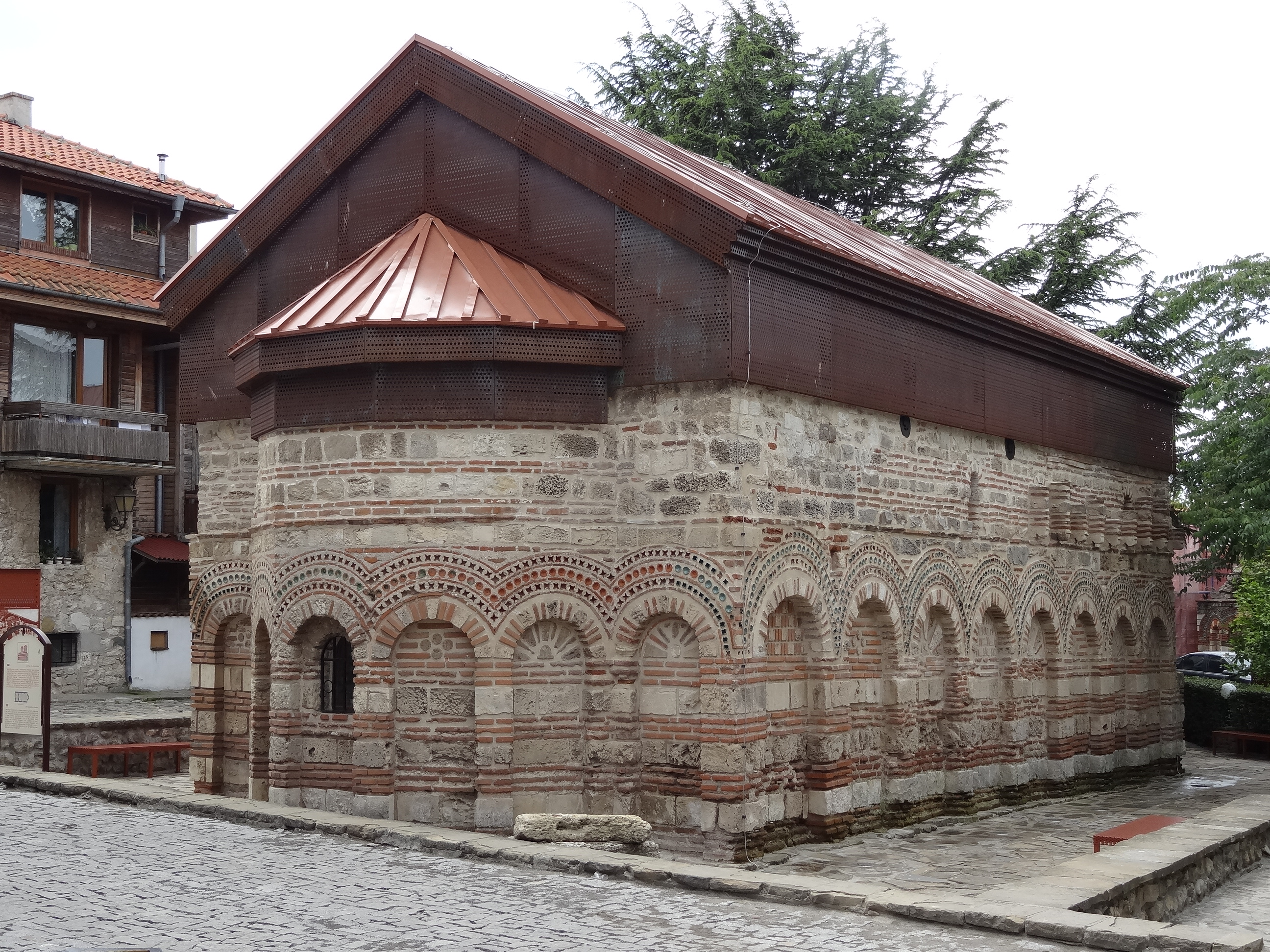 Church of Paraskevi in Nesebar